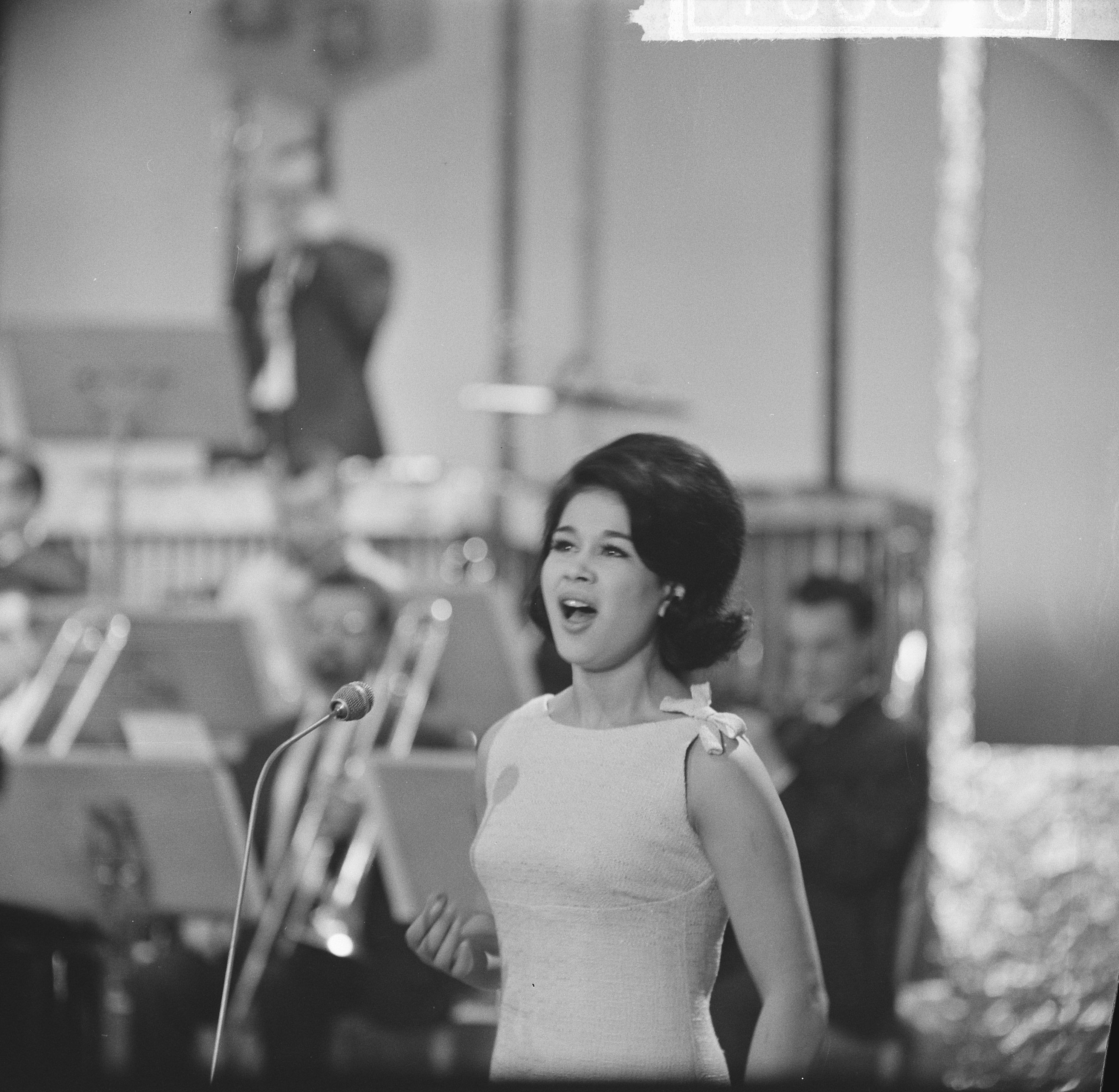 Collectie / Archief : Fotocollectie Anefo Reportage / Serie : [ onbekend ] Beschrijving : Nationaal Songfestival 1964. Anneke Grönloh Datum : 21 februari 1964 Trefwoorden : artiesten, muziek, songfestivals, zangeressen Persoonsnaam : Grönloh, Anneke Fotograaf : Nijs, Jac. de / Anefo Auteursrechthebbende : Nationaal Archief Materiaalsoort : Negatief (zwart/wit) Nummer archiefinventaris : bekijk toegang 2.24.01.03 Bestanddeelnummer : 916-0856